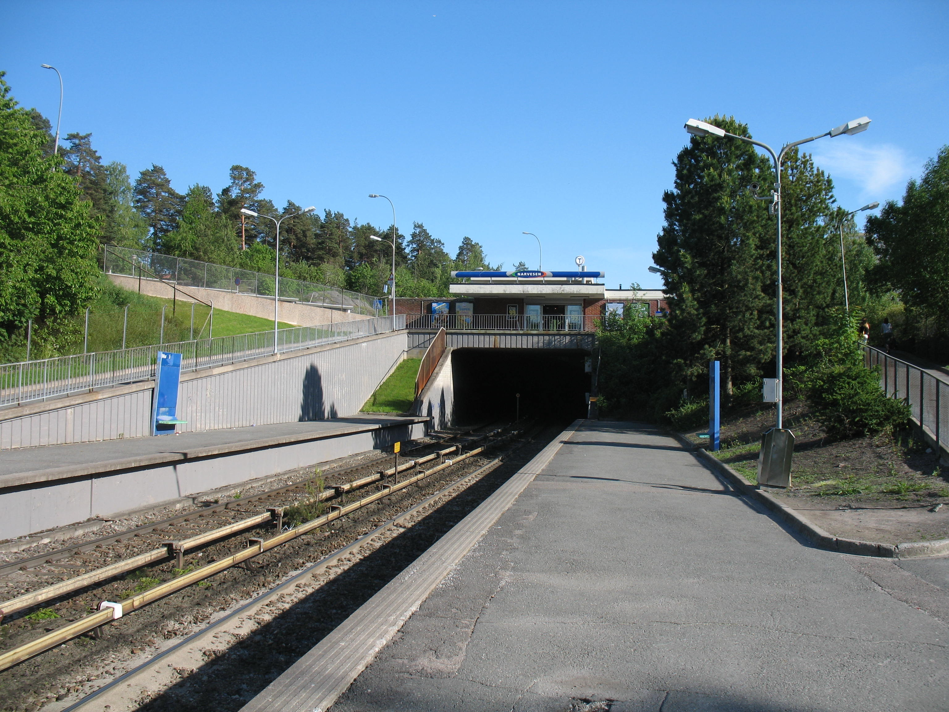 Munkelia stasjon, en T-banestasjon i Oslo